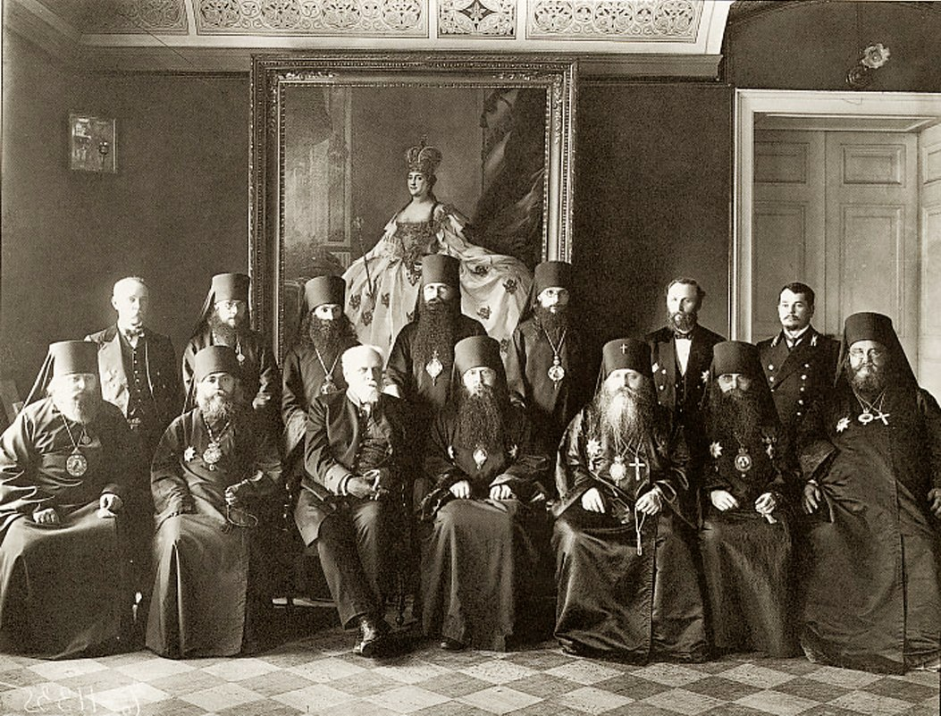 Группа членов Святейшего Синода. Участники Чрезвычайного собрания Святейшего Синода. 26 июля 1911 года в главном зале митрополичьего дома Александро-Невской лавры. В нижнем ряду: епископ Ямбургский Георгий (Ярошевский), епископ Туркестанский и Ташкентский Димитрий (Абашидзе) обер-прокурор Святейшего Синода В.К.Саблер, архиепископ Финляндский и Выборгский Сергий (Страгородский), архиепископ Волынский Антоний (Храповицкий), епископ Могилёвский и Мстиславский Стефан (Архангельский), епископ Чистопольский Алексий (Дородницын) в верхнем ряду неизв. неизв. епископ Тихвинский Андроник (Никольский), епископ Иннокентий (Ястребов) епископ Волоколамский Феодор (Поздеевский), неизв. неизв.